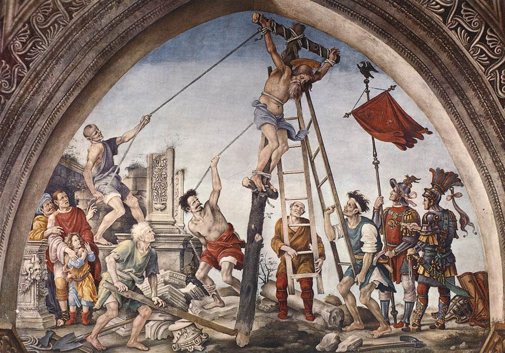 LIPPI, Filippino Crucifixion of St Philip Fresco Strozzi Chapel, Santa Maria Novella, Florence